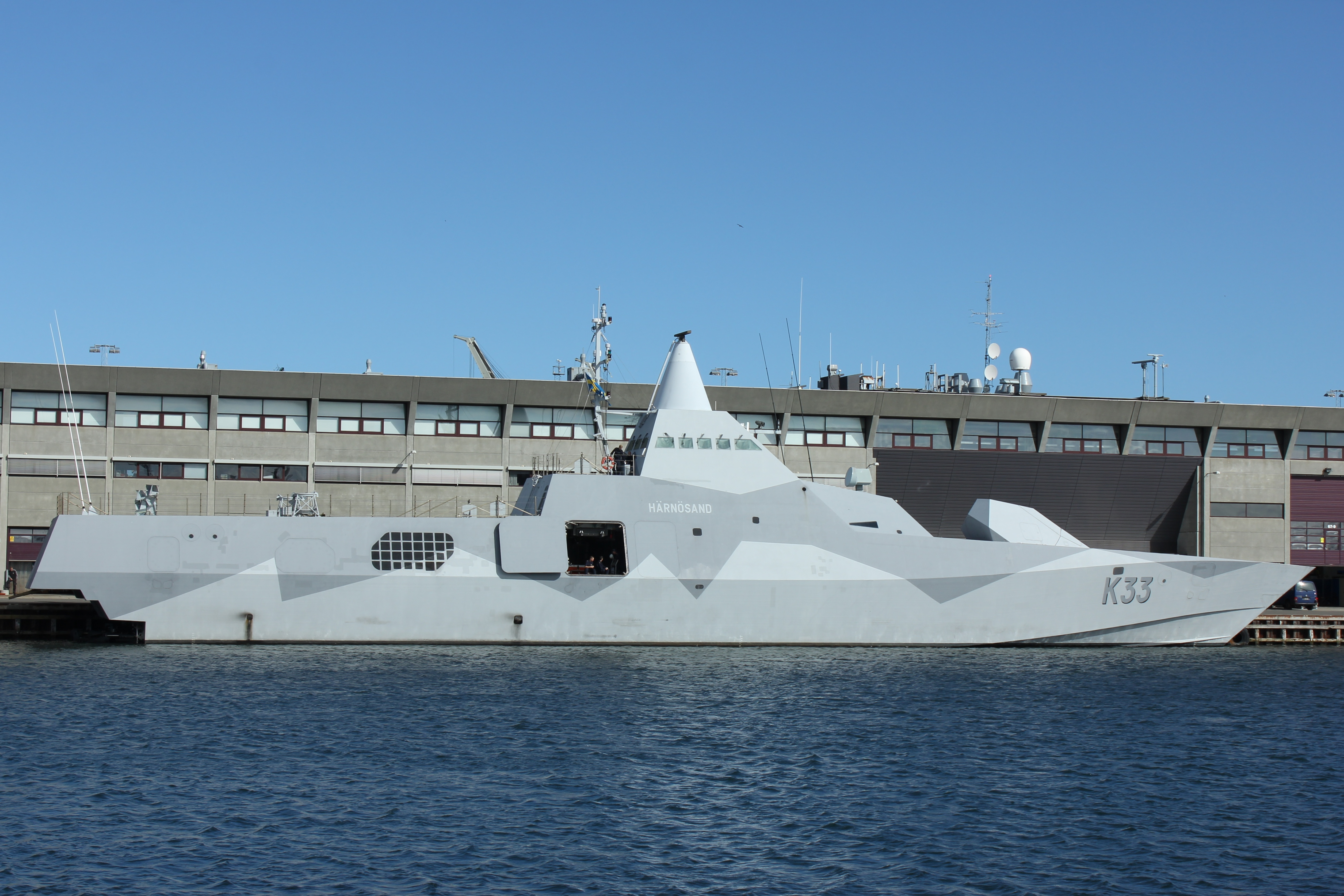 Härnösand (K33) på Flådestation Frederikshavn 2011